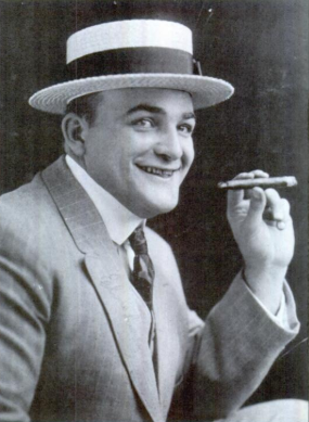 Actor Elmo Lincoln 1912